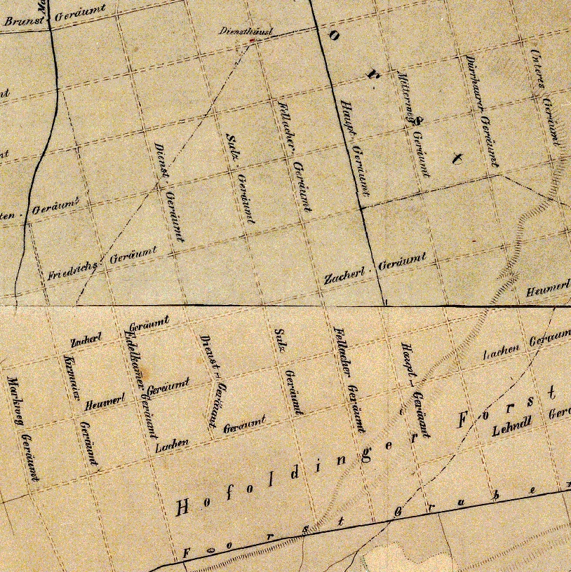 "Geräumte" (Schneisen) im Hofoldinger Forst, Bayern